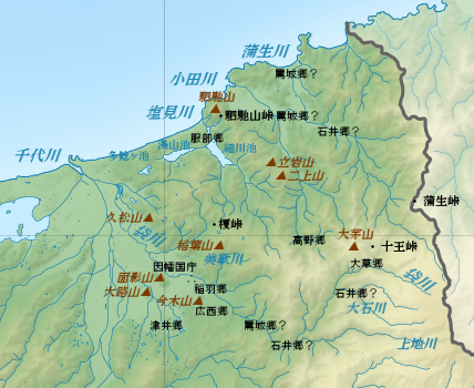 因幡国法美郡関連地図